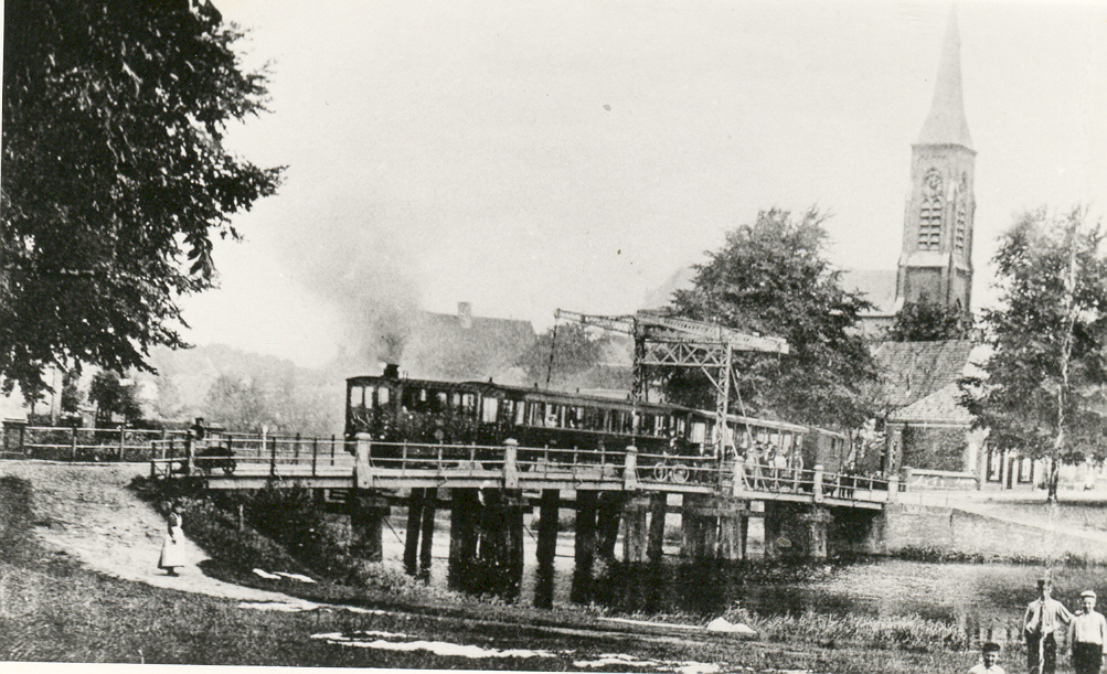 Tram op de brug over de oude ijssel. Omdat de brug in jaren dertig vervangen is en men in 1936 stopte met het personenvervoer schat ik vermoedelijk genomen tussen 1890 en 1920. let daarbij ook op de kleding van de personen. De Tram staat stil en rijdt niet! In de begin jaren van de fotografie was het fotograveren van bewegende objecten een probleem. vandaar voor 1920.